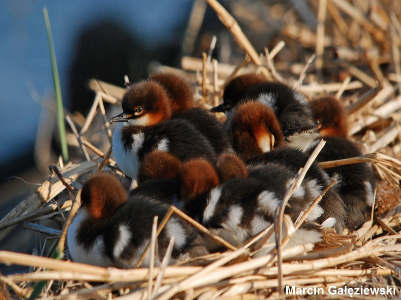 młode tracza nurogęsi autor: Marcin Gałęziewski